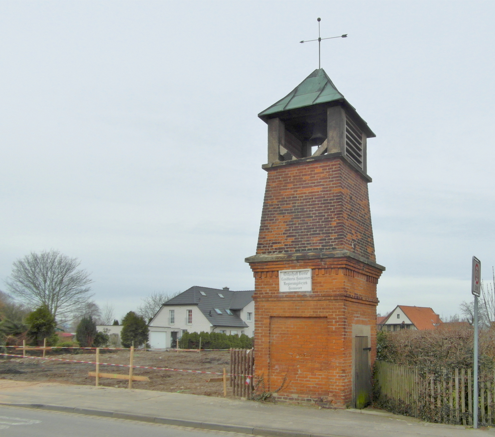 Der denkmalgeschützte Feuerwehrturm Vörie im Juli 2014. Die benachbarte Scheune war schon abgerissen. Inzwischen steht auf ihrem Grundstück ein Neubau